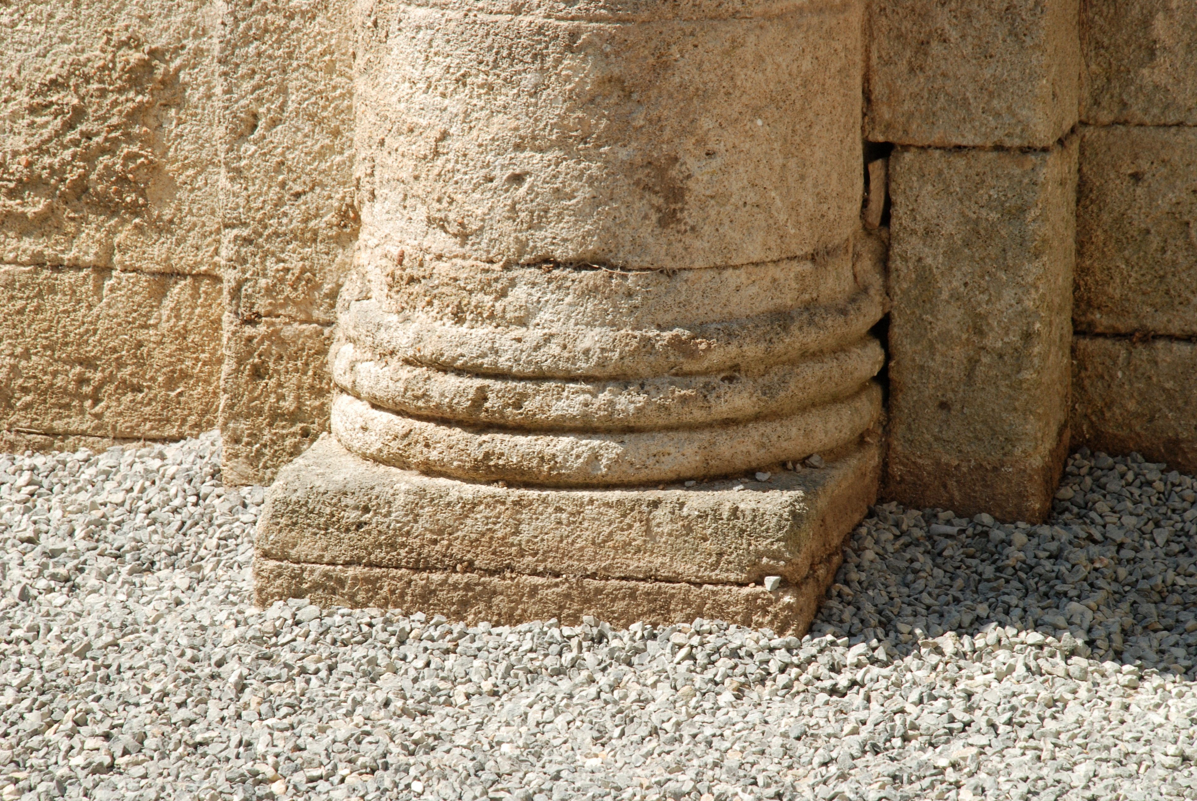 France - Gard - Église Saint-André de Souvignargues